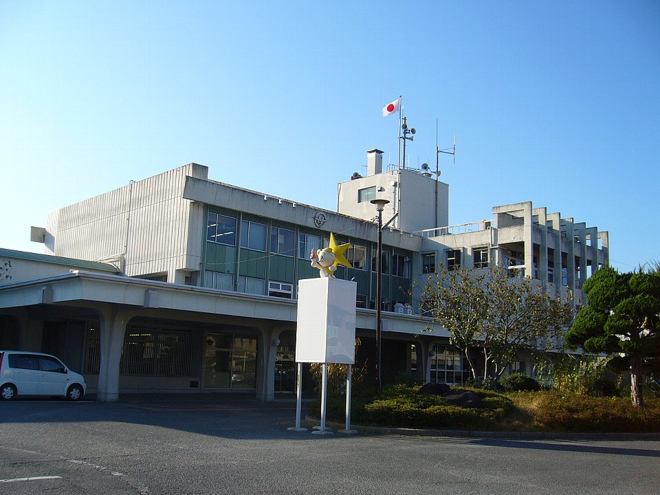 瀬戸町役場（現・岡山市東区瀬戸支所）